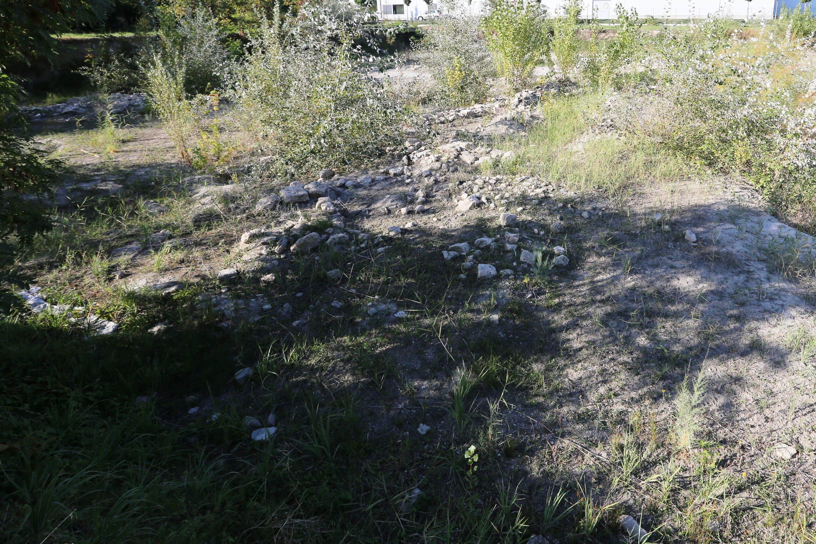 albertfalvai római tábor romjai This is a photo of a monument in Hungary, Identifier: 1103